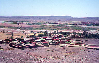 Village marocain, dans la vallée du Draa au nord de Ouarzazatte.